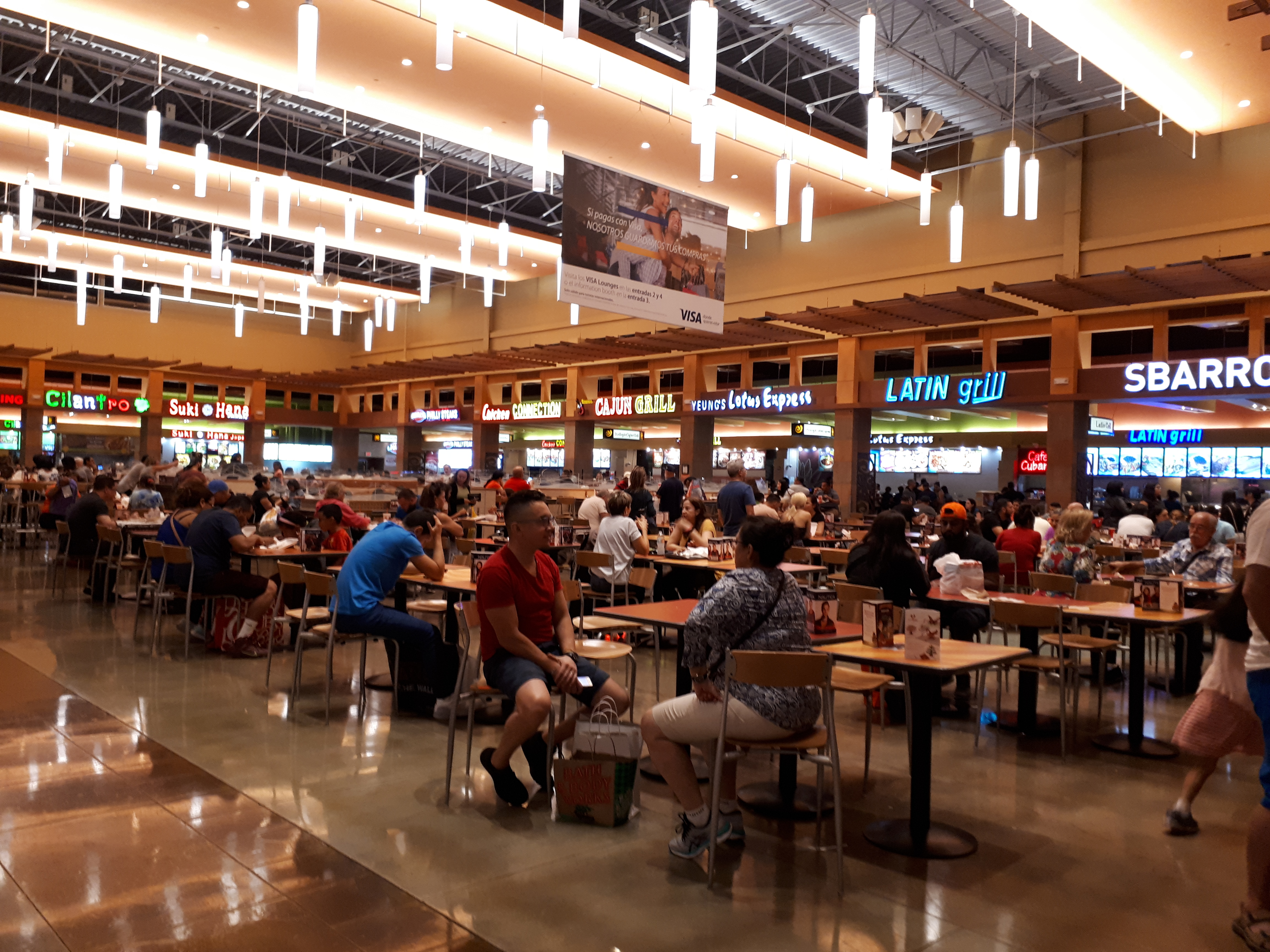 Food-Court der Dolphin Mall in Sweetwater, Florida, im November 2017